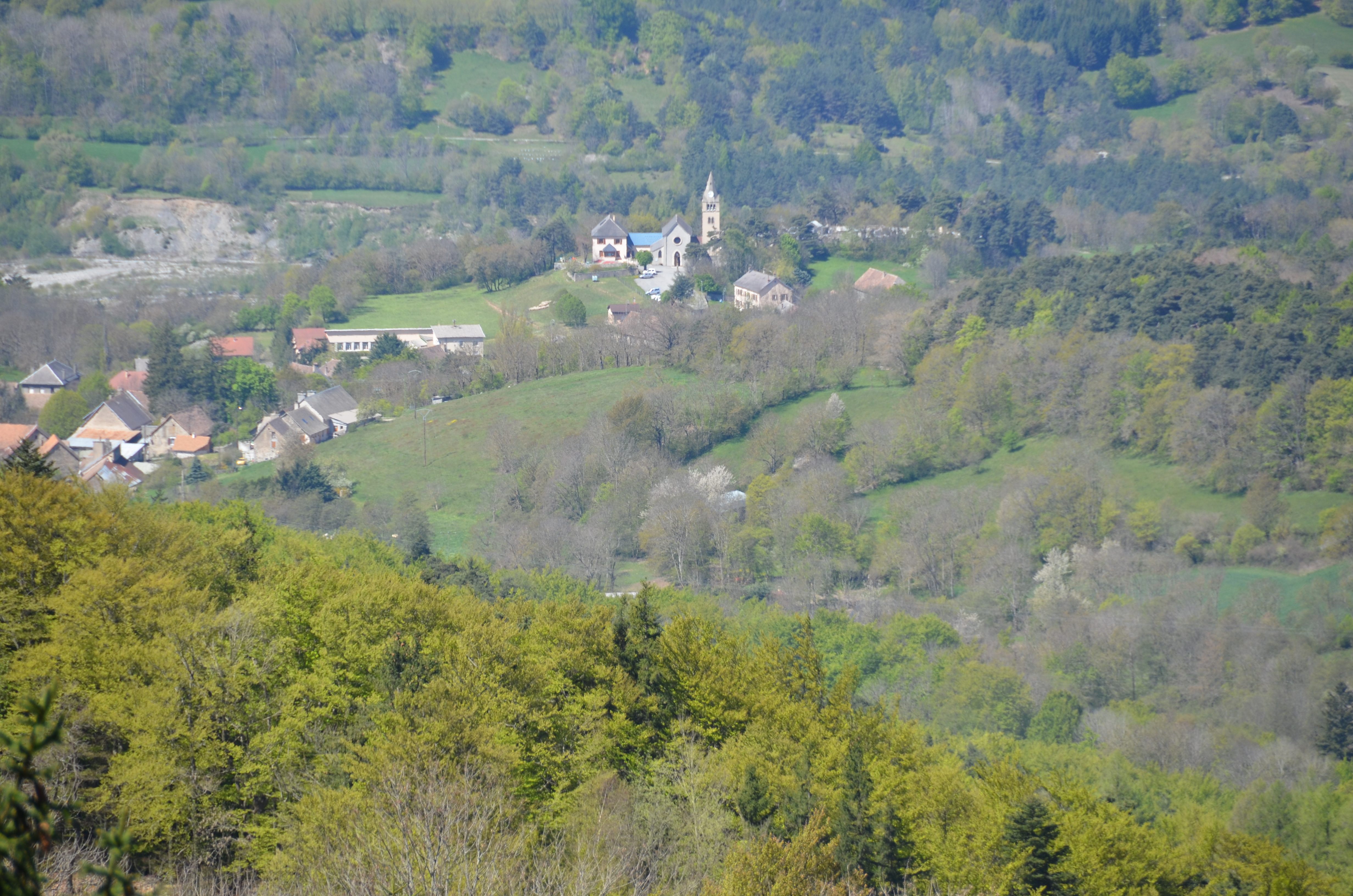 Le village de Chauffayer Place de la mairie